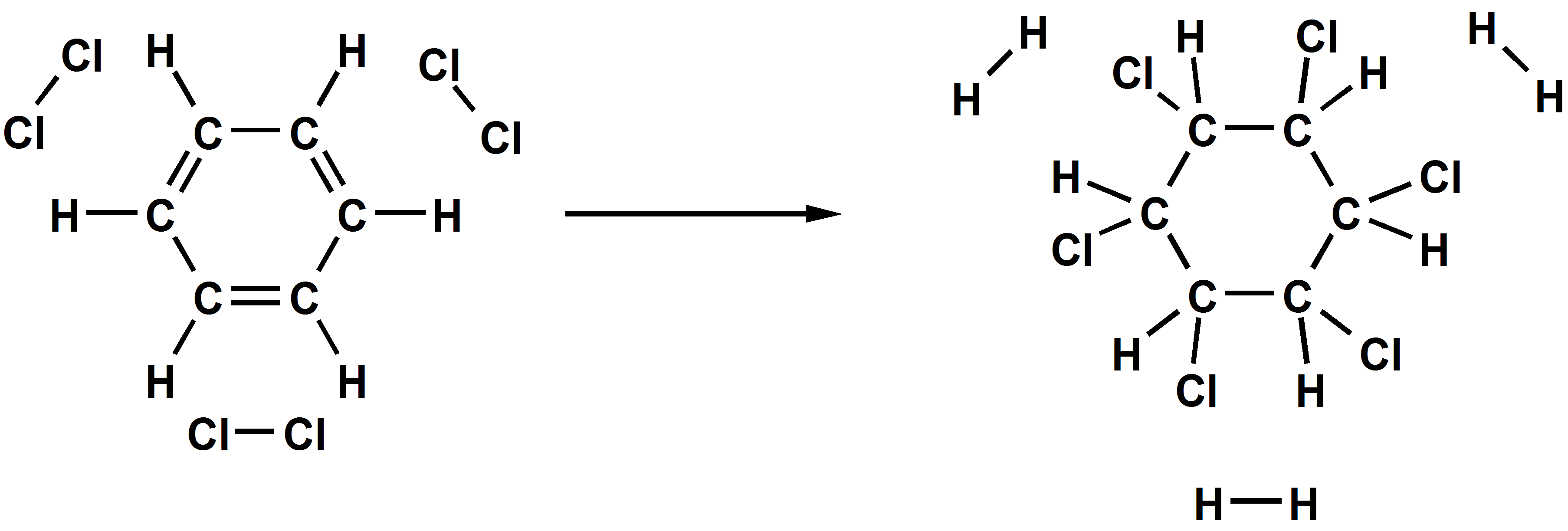 Benzene Cl addition lb 2d